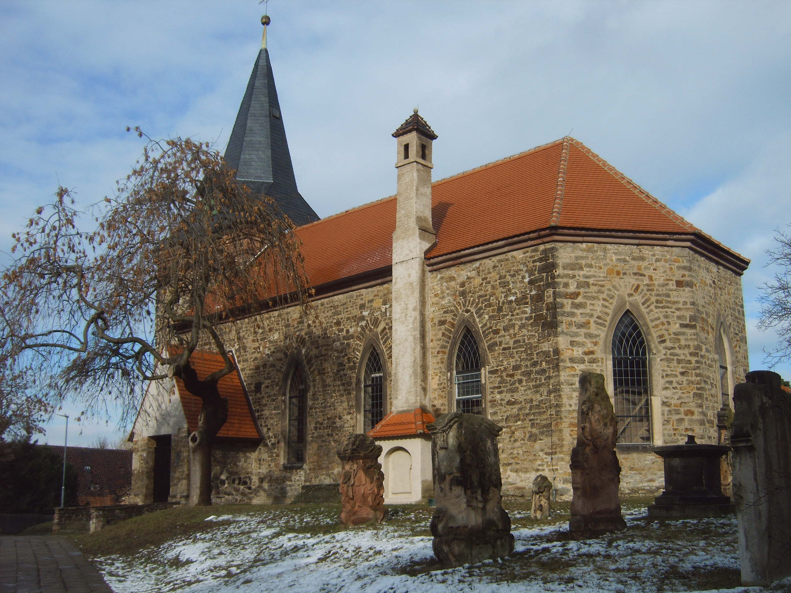 Kirche St. Peter und Paul in Volkstedt (Sachsen-Anhalt)